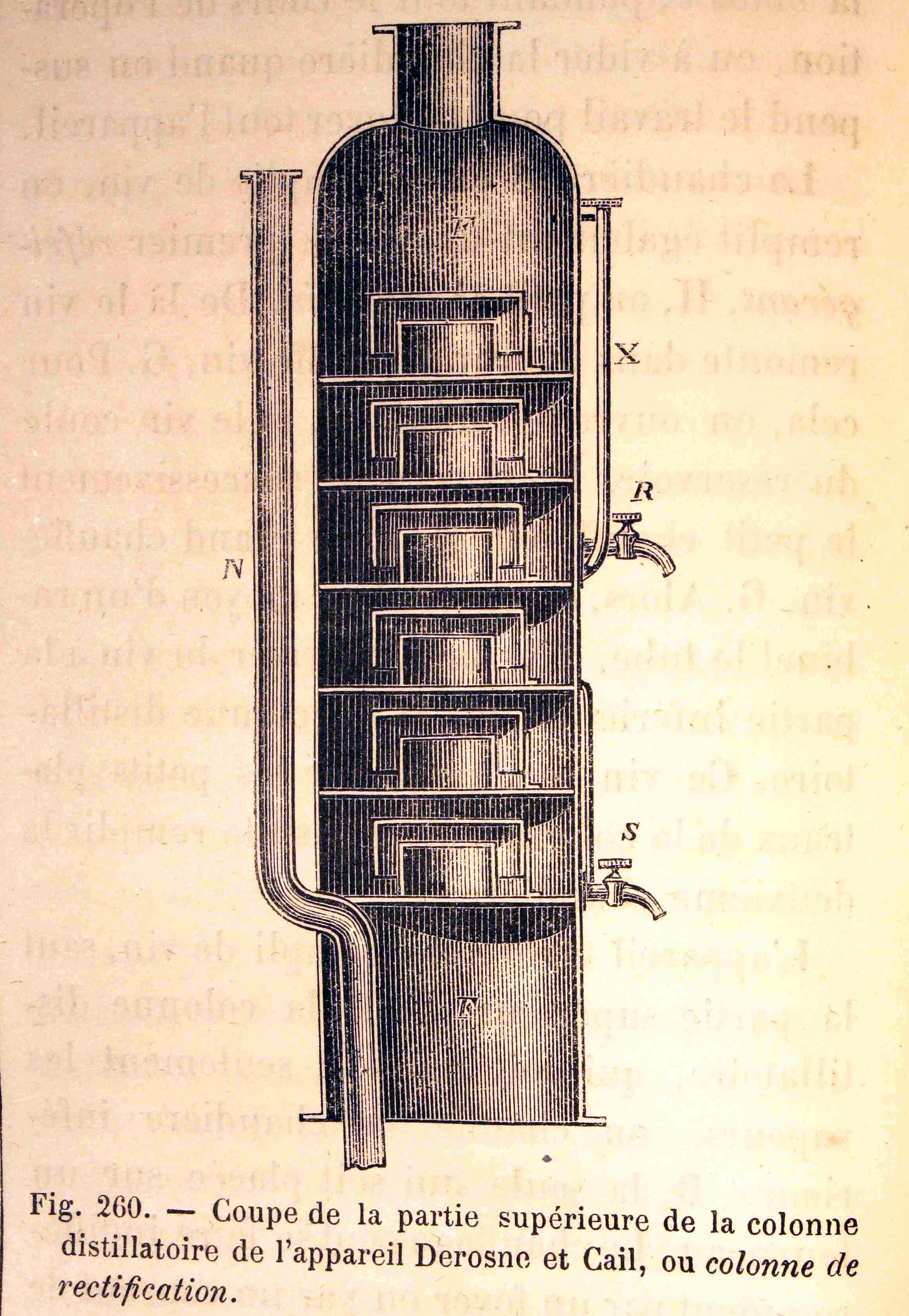 "Coupe de la partie supérieure de la colonne distilatoire de l'appareil Derosne et Cail, ou colonne de rectification". Ilustraciones de la obra : Les merveilles de l'industrie ou, Description des principales industries modernes / par Louis Figuier. - Paris : Furne, Jouvet, [1873-1877]